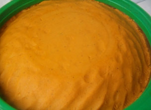 photos plat africain